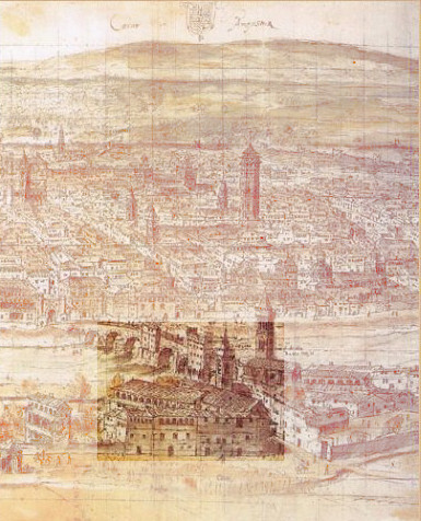 Dibujo de Zaragoza en 1563 de Anton Van Wyngaerde.